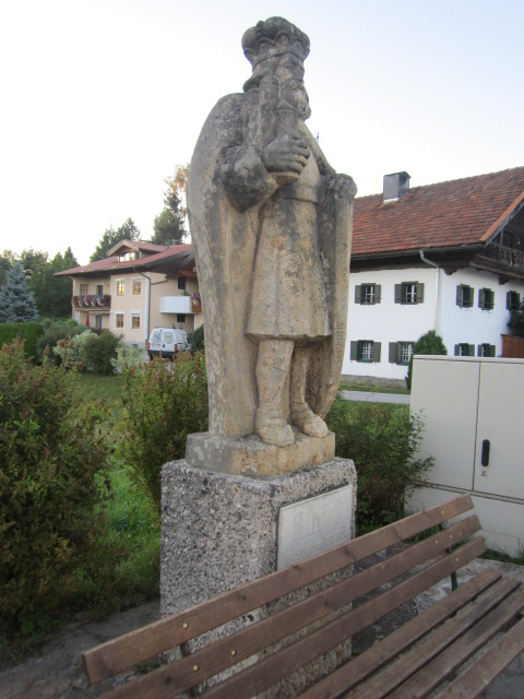 statua patrono nel comune di Perwang